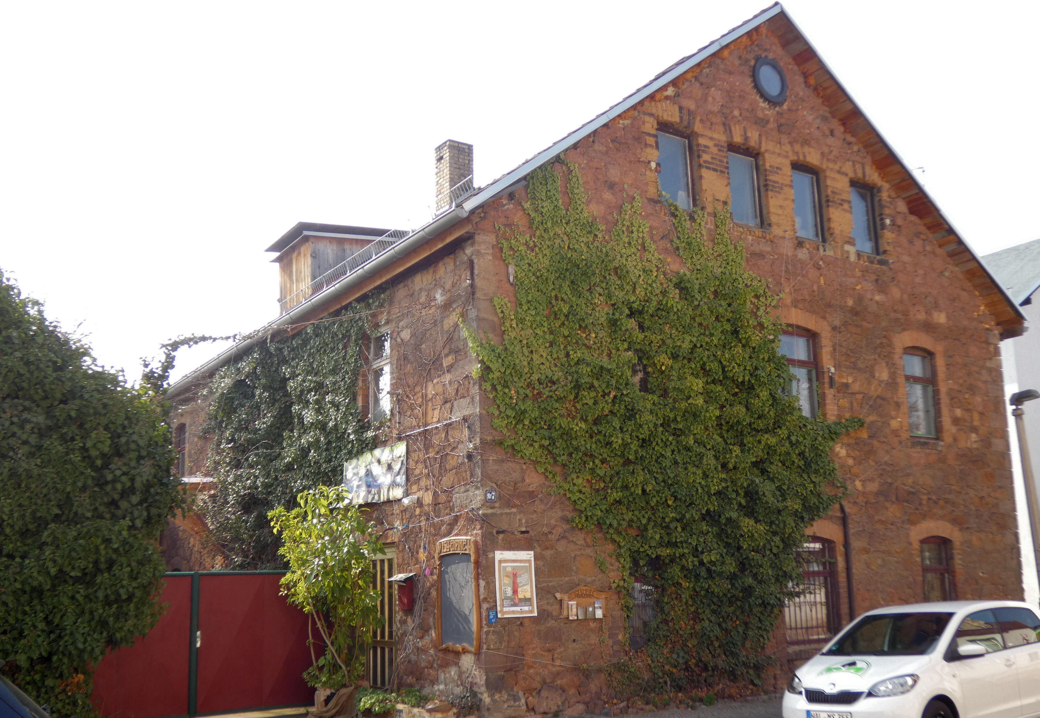 Hansastraße 7, Halle (Saale), ehemaliges Landarbeiterhaus This is a photograph of an architectural monument. 70977